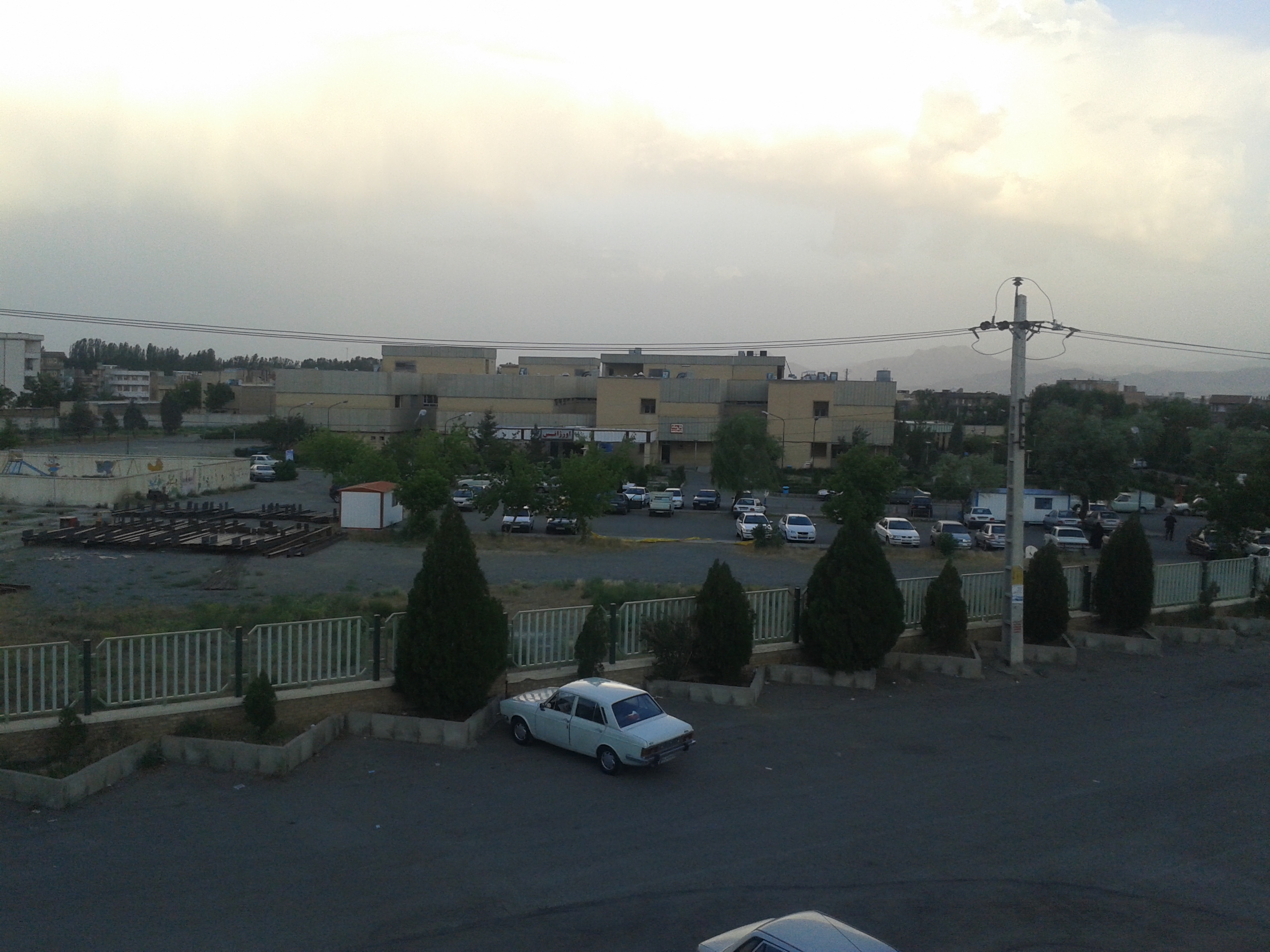 بیمارستان خاتم الانبیاء -سلماس